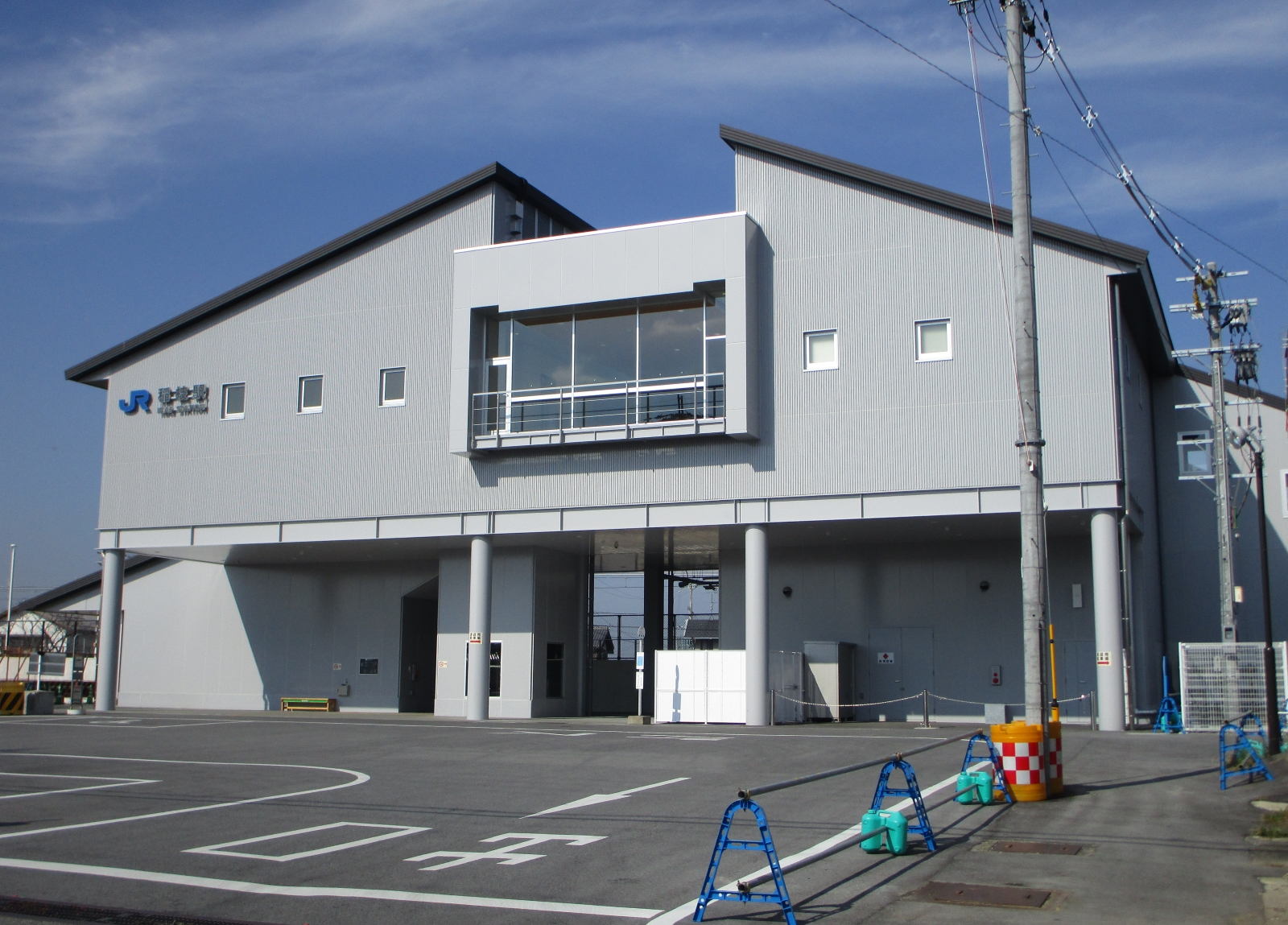 稲枝駅駅舎（2017年11月時点）